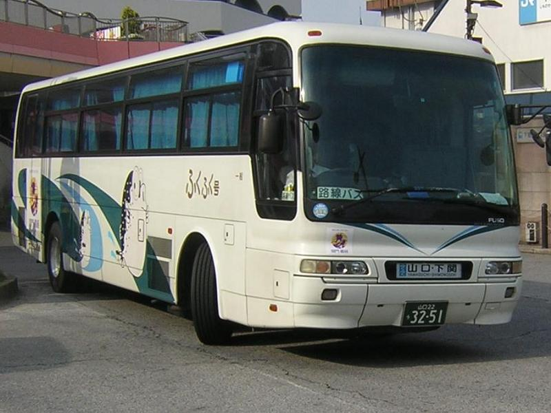 登録番号 山口22う32-51 サンデン交通所属 ふくふく大阪号用 三菱ふそうエアロバス 2005年5月5日 下関駅前にて撮影 現在はご当地ナンバー導入に伴い下関ナンバーに改番されている。